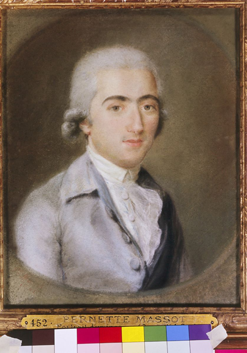 Pastel, sur parchemin. Forme : support peint circulaire